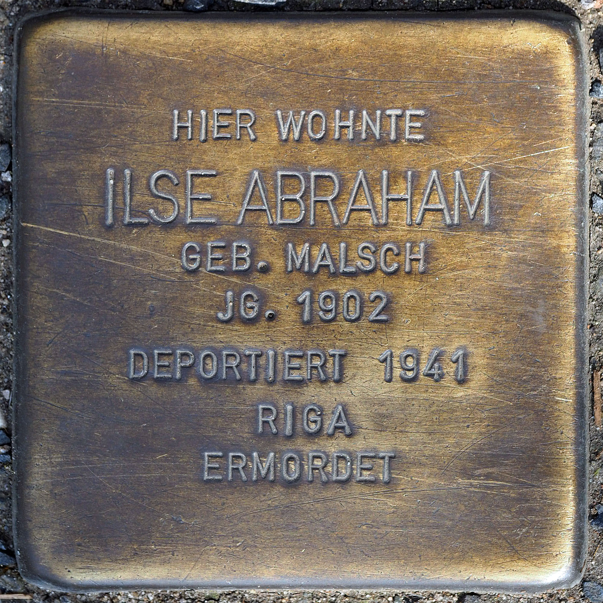 Stolpersteine MG: Abraham, Ilse